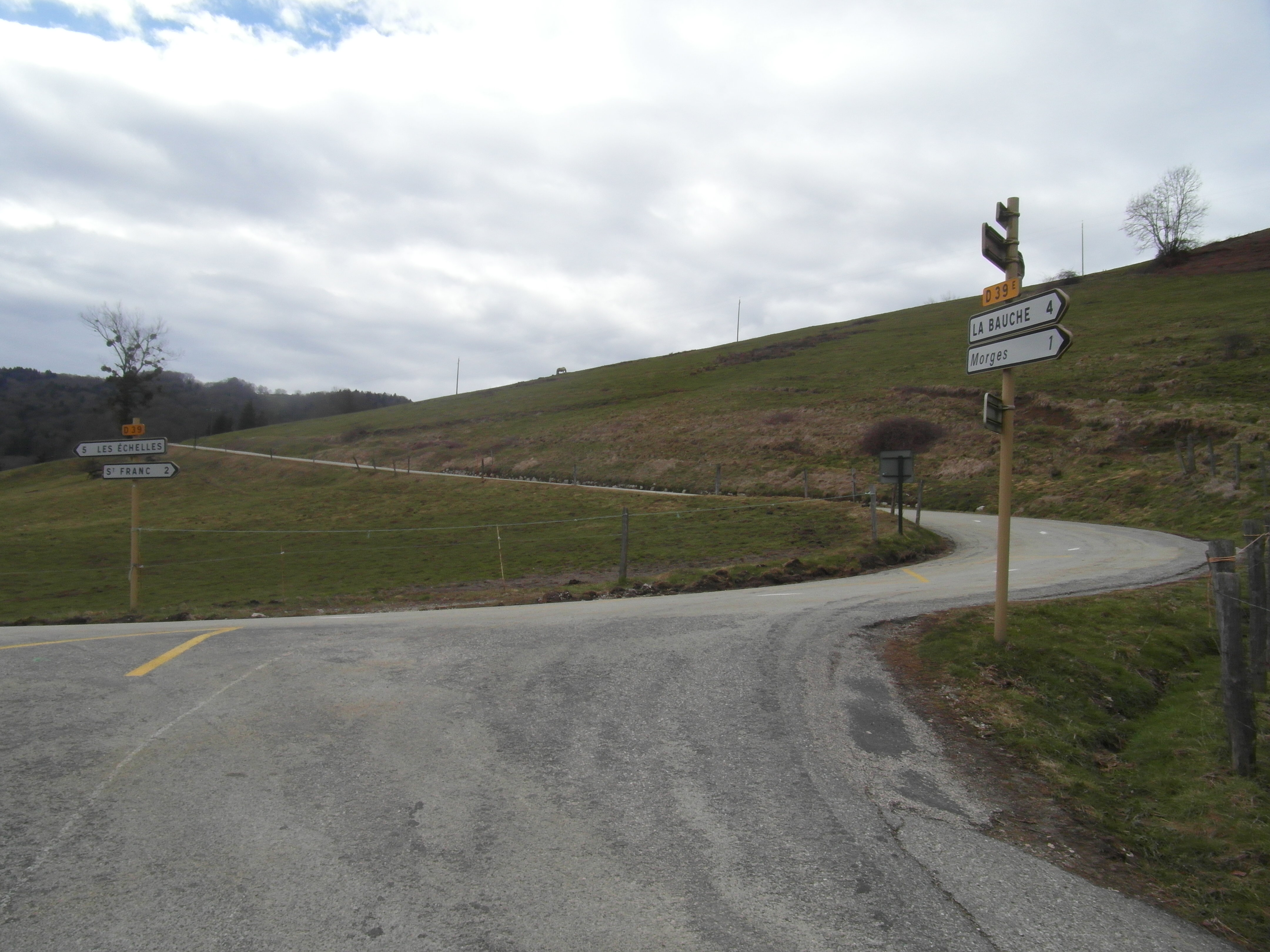 RD39 à Saint-Franc